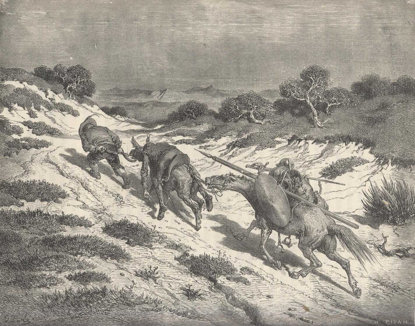 Dom Quixote alquebrado transportado pelo burro puxado pela arreata por Sancho Pança, vindo o Rocinante carregando as armas atrás.